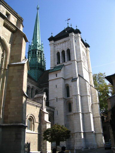 Cathédrale Saint-Pierre in Geneva